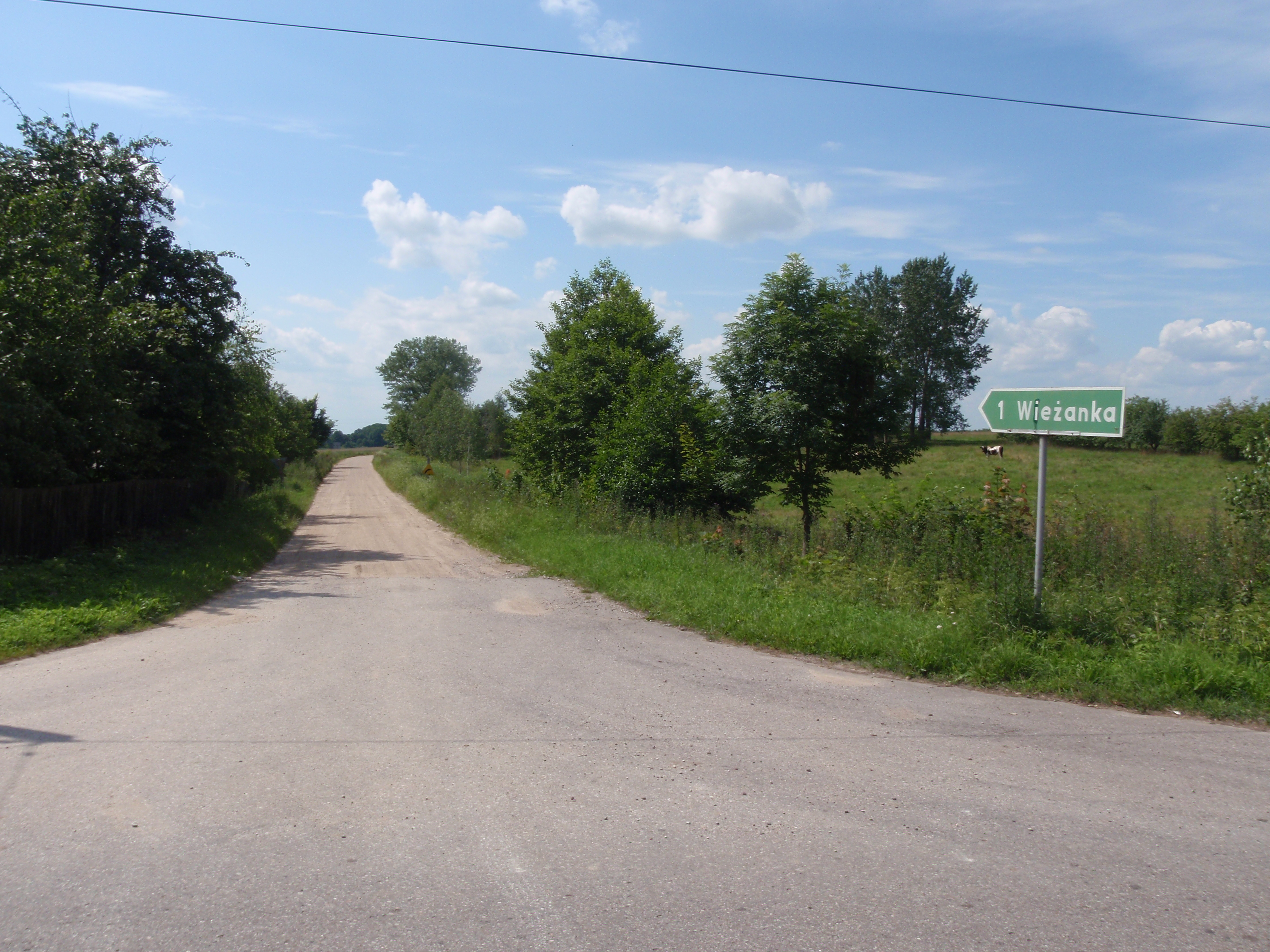 Trywieża - droga do wsi Wieżanka